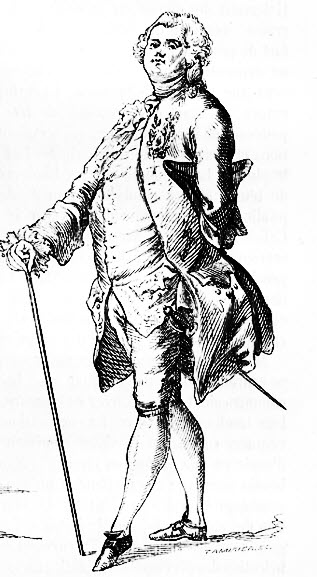 Edmond Lechevallier-Chevignard d'après Claude Joseph (dit Joseph) Vernet (1714-1789), gravé par Charles Tamisier (actif 1855-1864), Matrone à l'ancienne mode, Jeune femme en coiffure haute et petit panier, Ancien militaire, Gentilhomme avec l'habit habillé, en 1762, gravure tirée du Magasin pittoresque, 1864, n° 32, p. 253. - rogné